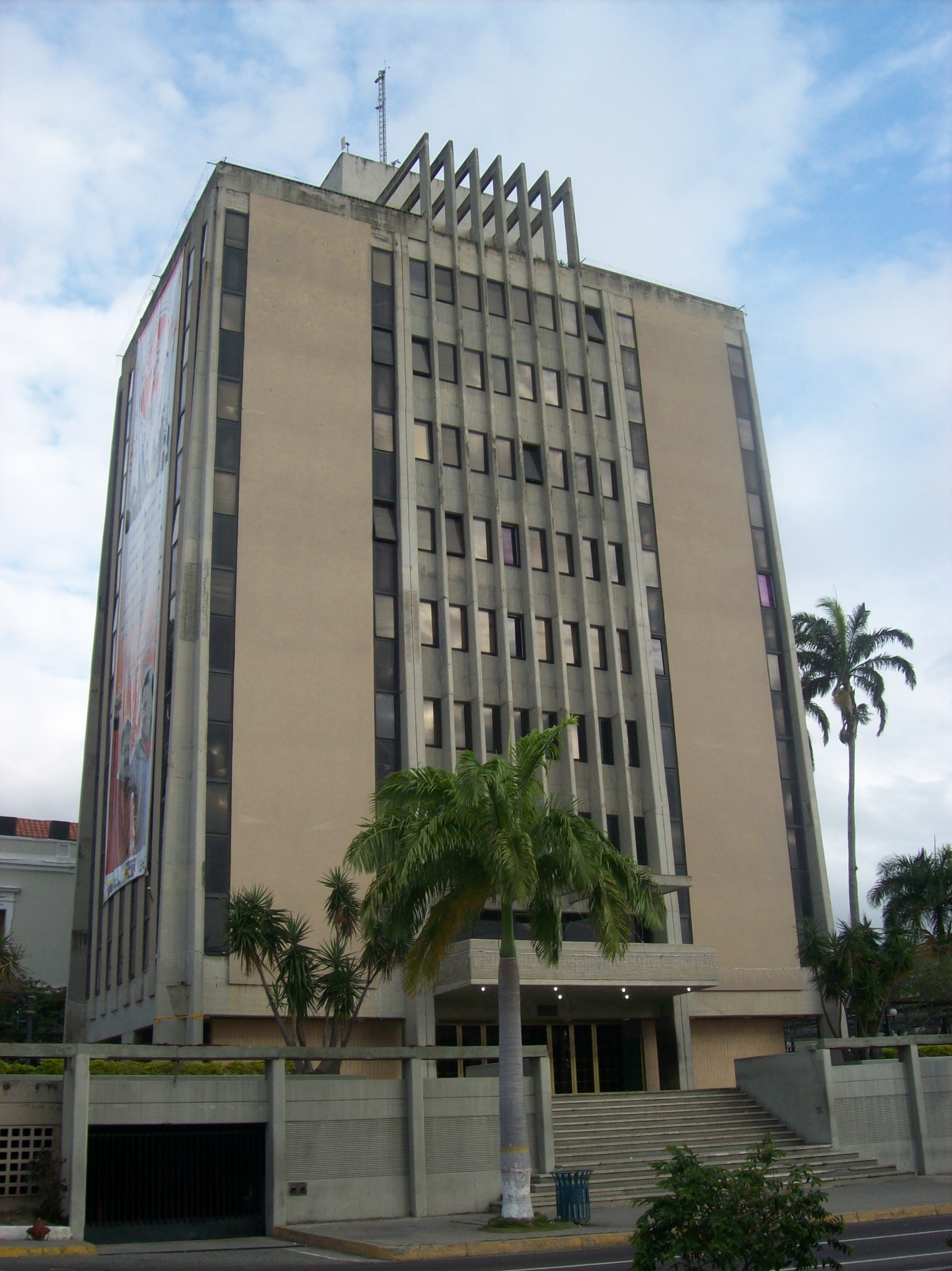 Edif. administrativo Gobierno de Yaracuy